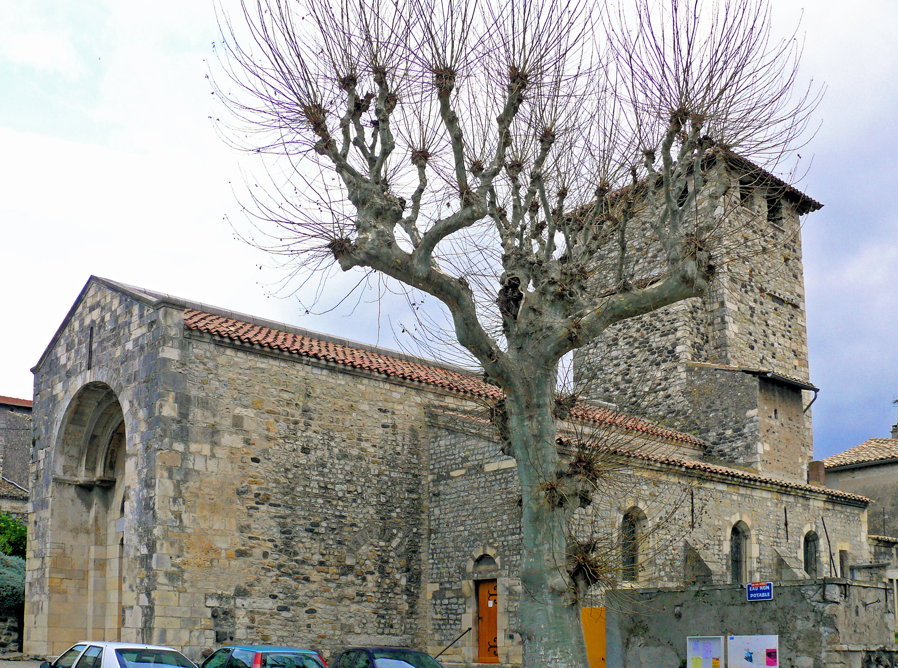 Le Teil - Église Saint-Étienne de Mélas - Côté sud de l'église